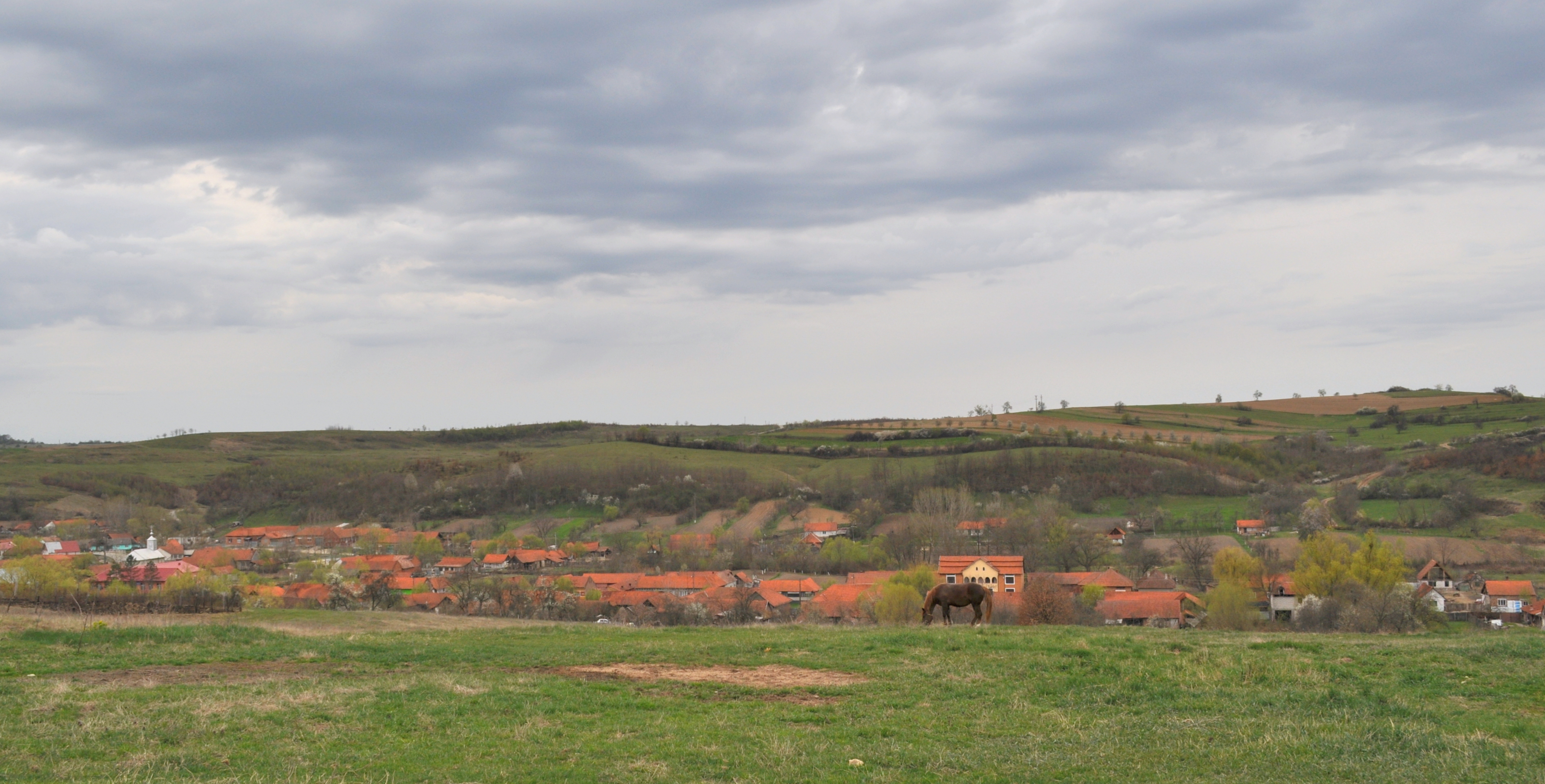 Ohaba Lungă, județul Timiș